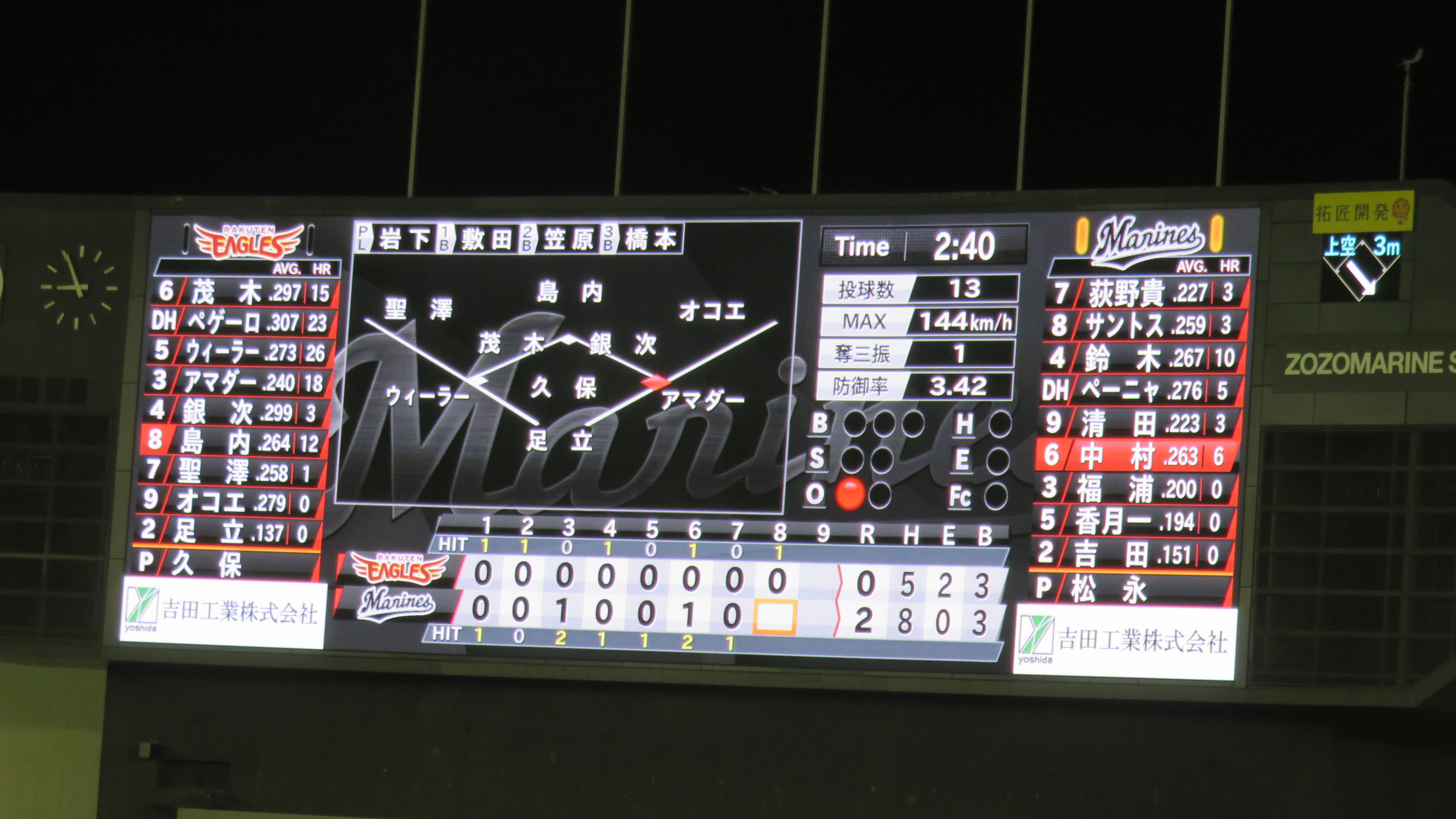 ZOZOマリンスタジアムのメインスコアボード（2017年撮影）。